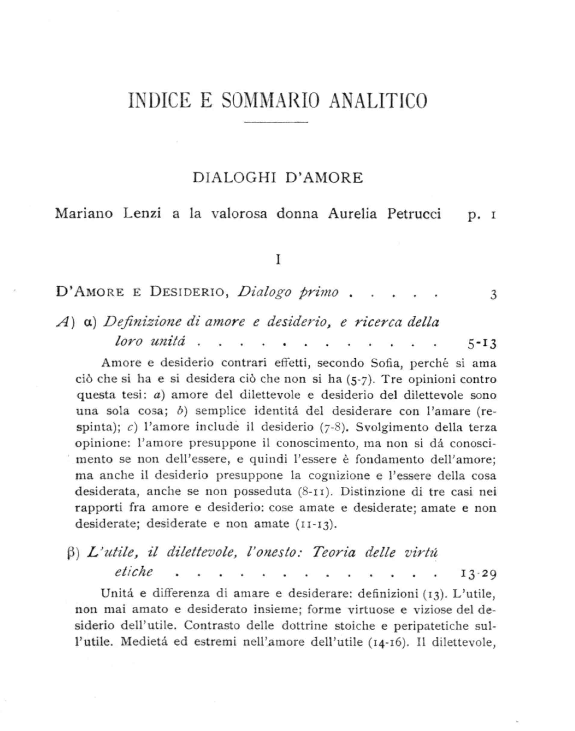 Dialoghi d'amore / Leone Ebreo (Giuda Abarbanel) ; a cura di Santino Caramella. - Bari : G. Laterza, 1929. - 457 p. ; 22 cm. - (Scrittori d'Italia ; 114) .